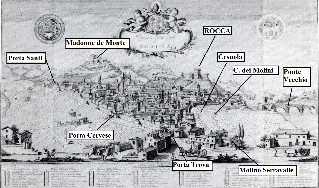 Gravure de 1775 de Cesena - détail des portes, des murs et des infrastructures (Université d'Architecture de Cesena-Bologne)